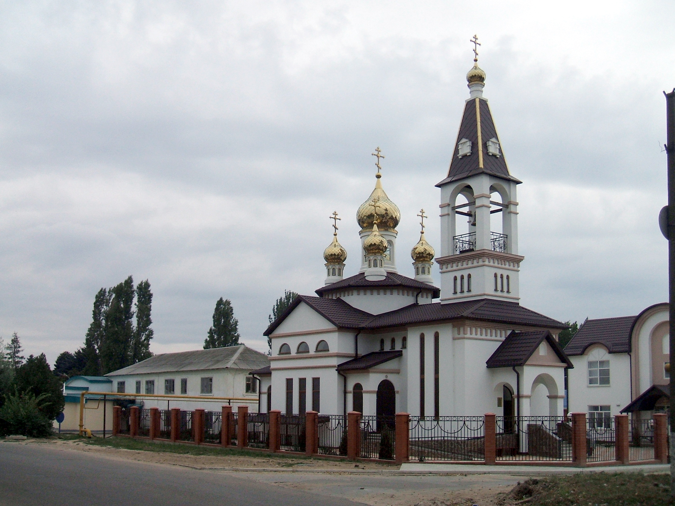 Храм Пантелеимона Целителя в станице Голубицкая (Темрюкский район Краснодарского края)